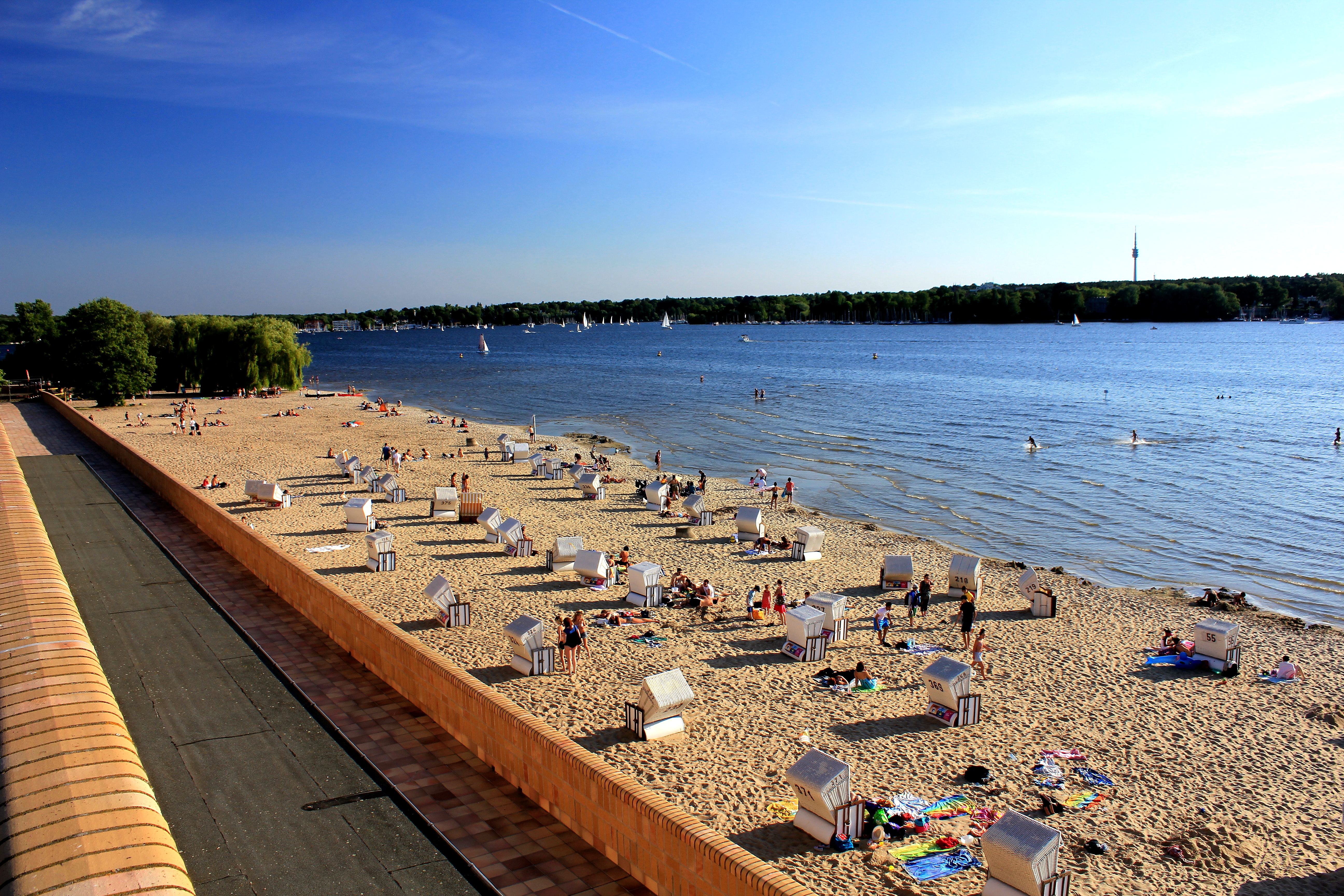 Strandbad Wannsee (Berlin)